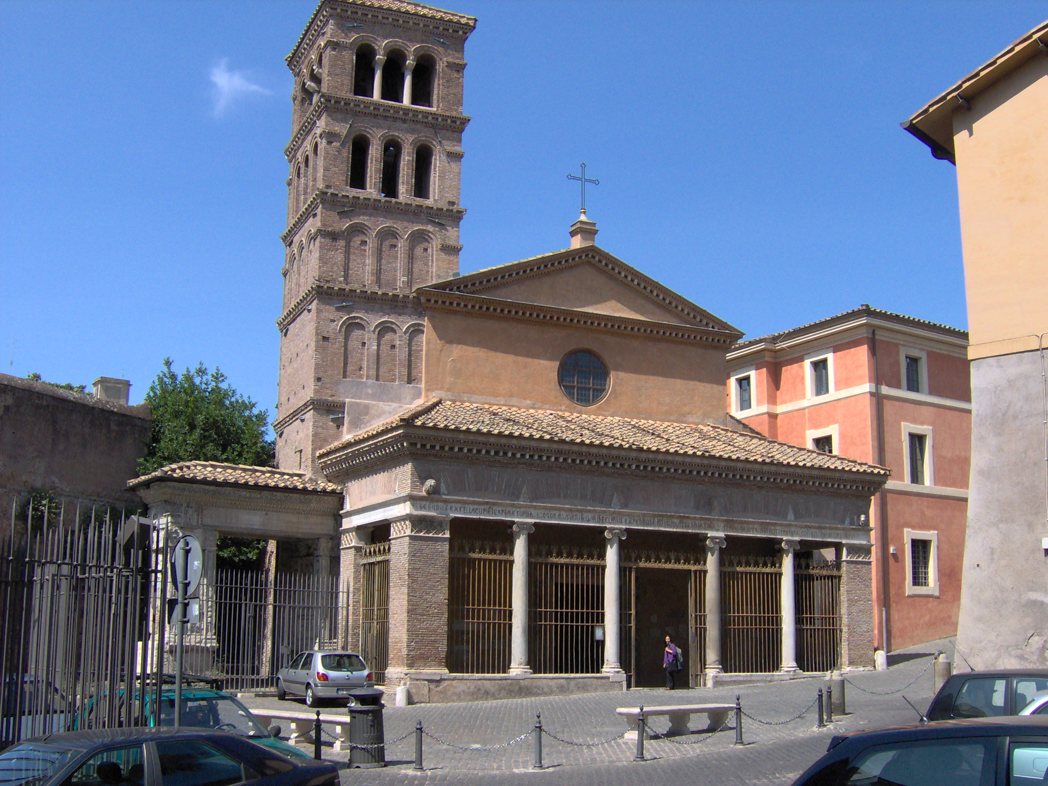 San Giorgio in Velabro - Roma